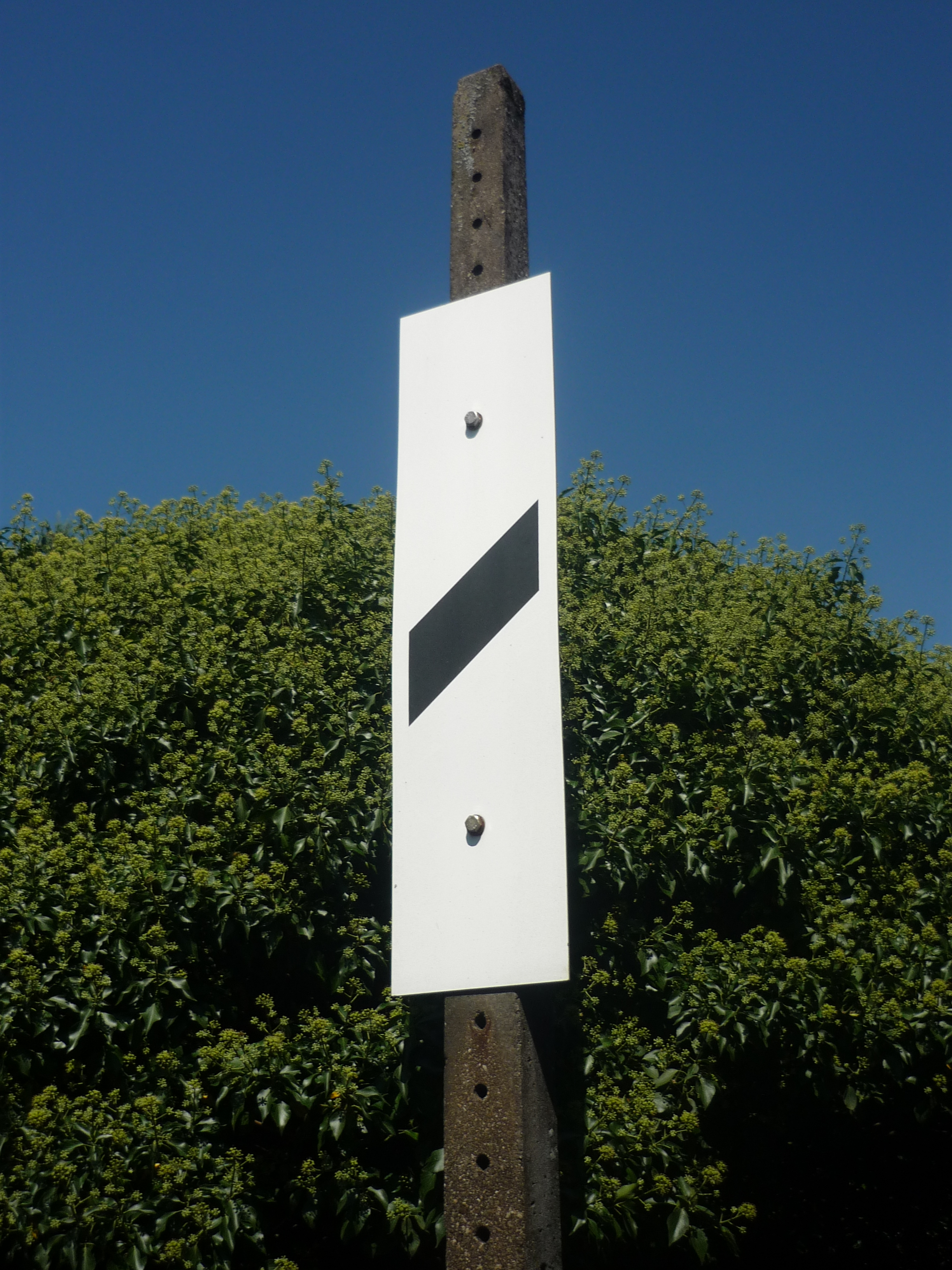 Signal SNCF nommé Mirliton, photo prise en gare de Meaux (77).